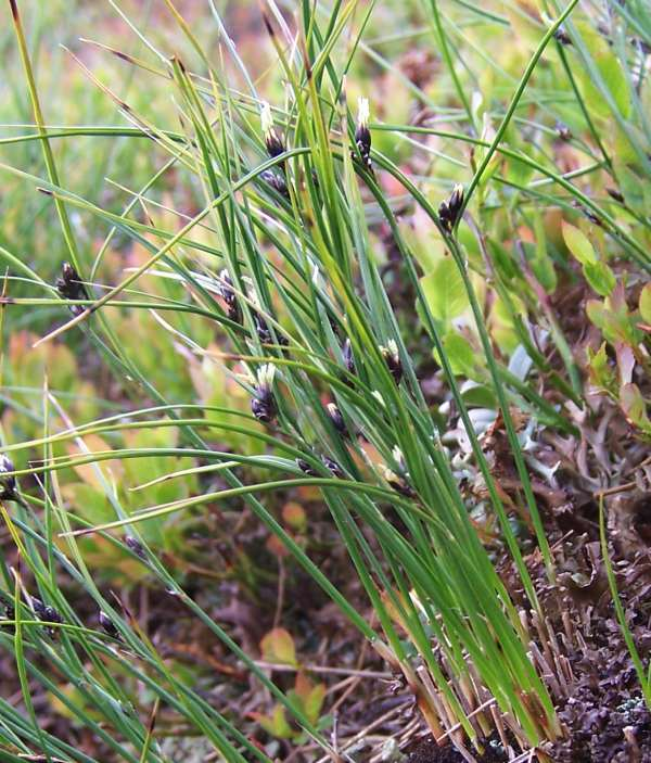 Juncus trifidus (pl. Sit skucina), habitat: Tatra Mountains, Ornak